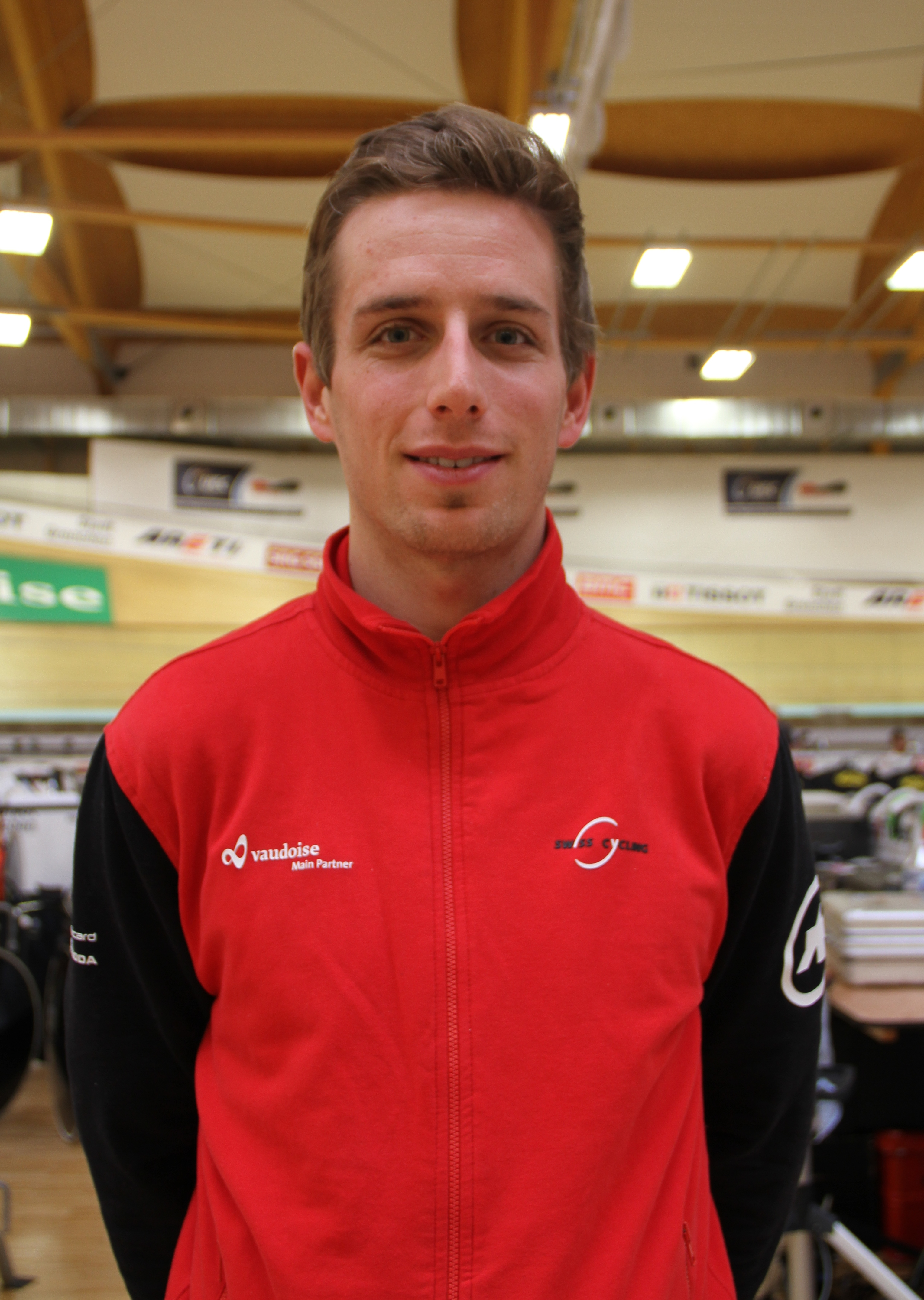 Beer, Olivier, Schweizer Radsportler The making of this document was supported by the Community-Budget of Wikimedia Germany.